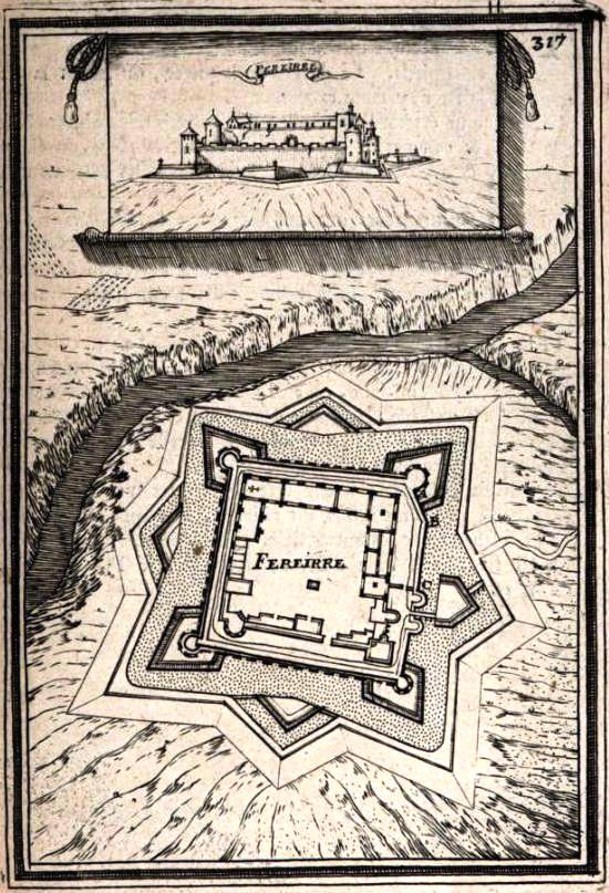 "Méthode de fortifier les petites villes et les châteaux situez sur les montagnes." "Fereirre".